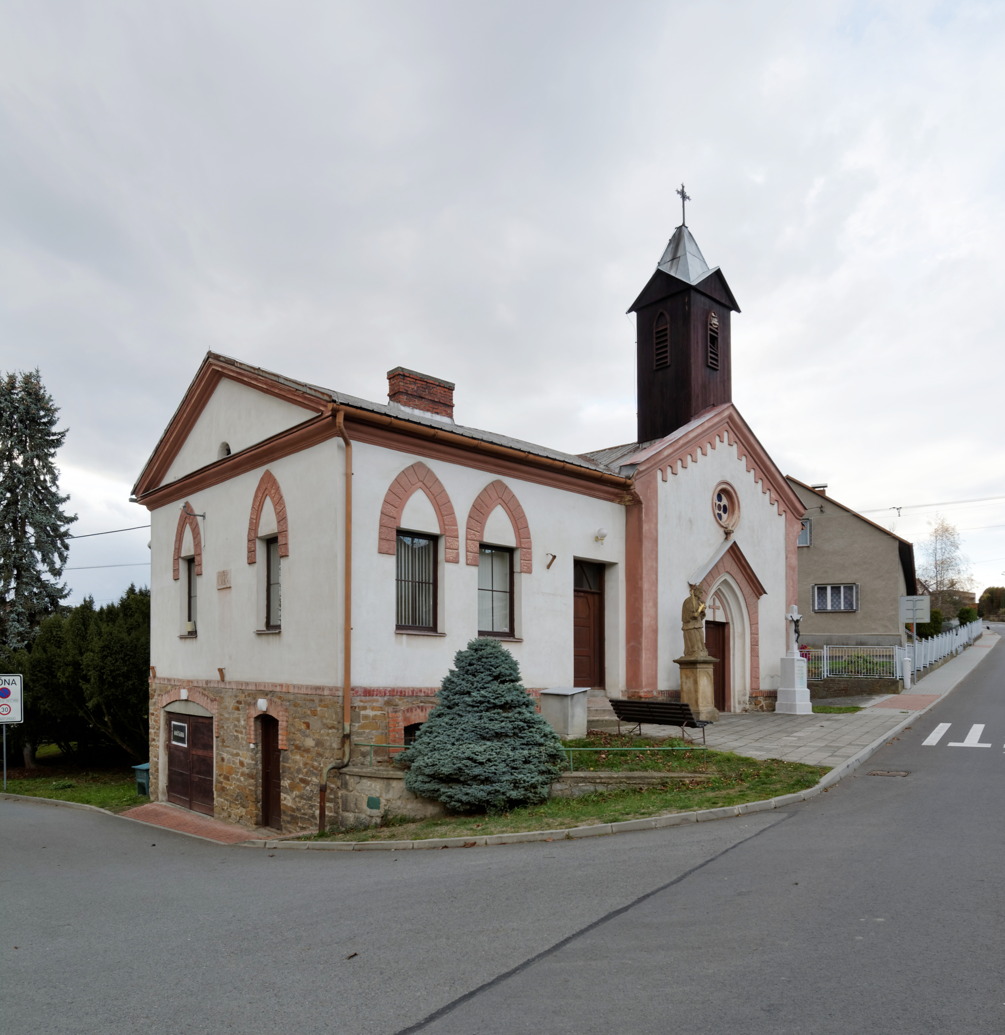 Starý obecní úřad v Dobroslavicích s kaplí svatého Jana Nepomuckého.